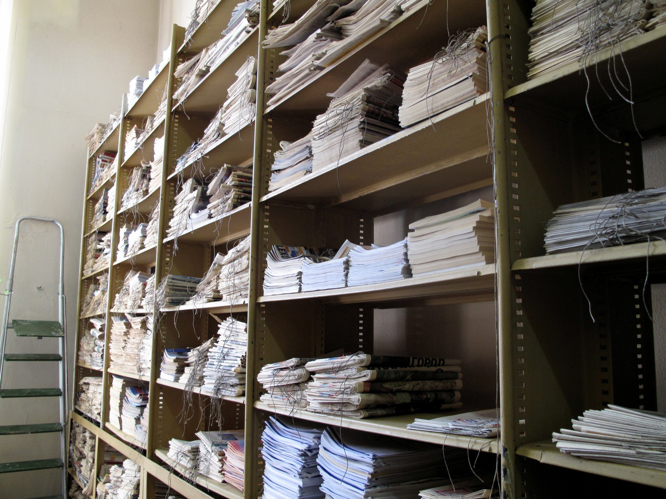 Відділ газетних фондів